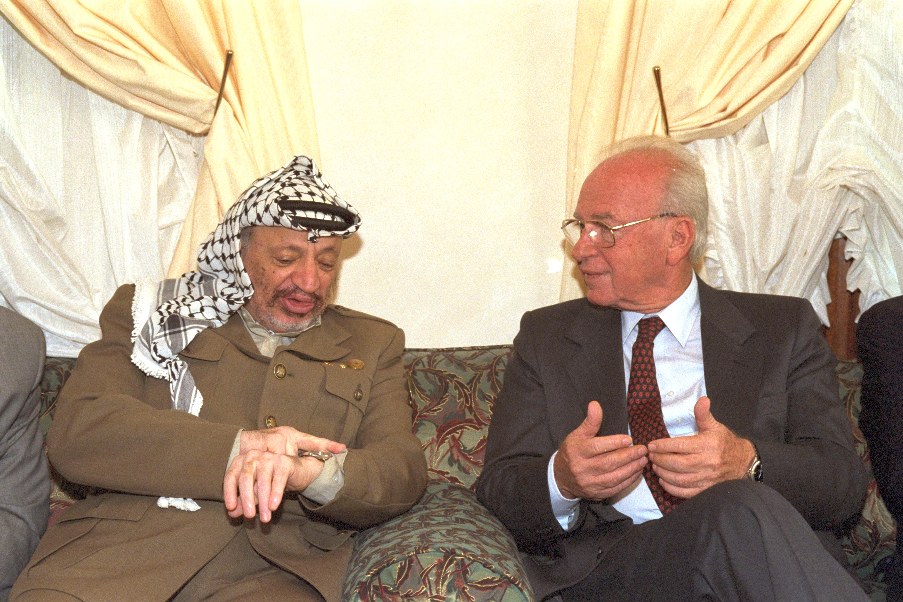 PRIME MINISTER YITZHAK RABIN MEETING IN CASABLANKA WITH PLO CHAIRMAN YASSER ARAFAT. ראש הממשלה יצחק רבין בפגישתו עם יור אשף יאסר עראפת בקזבלנקה שבמרוקו.